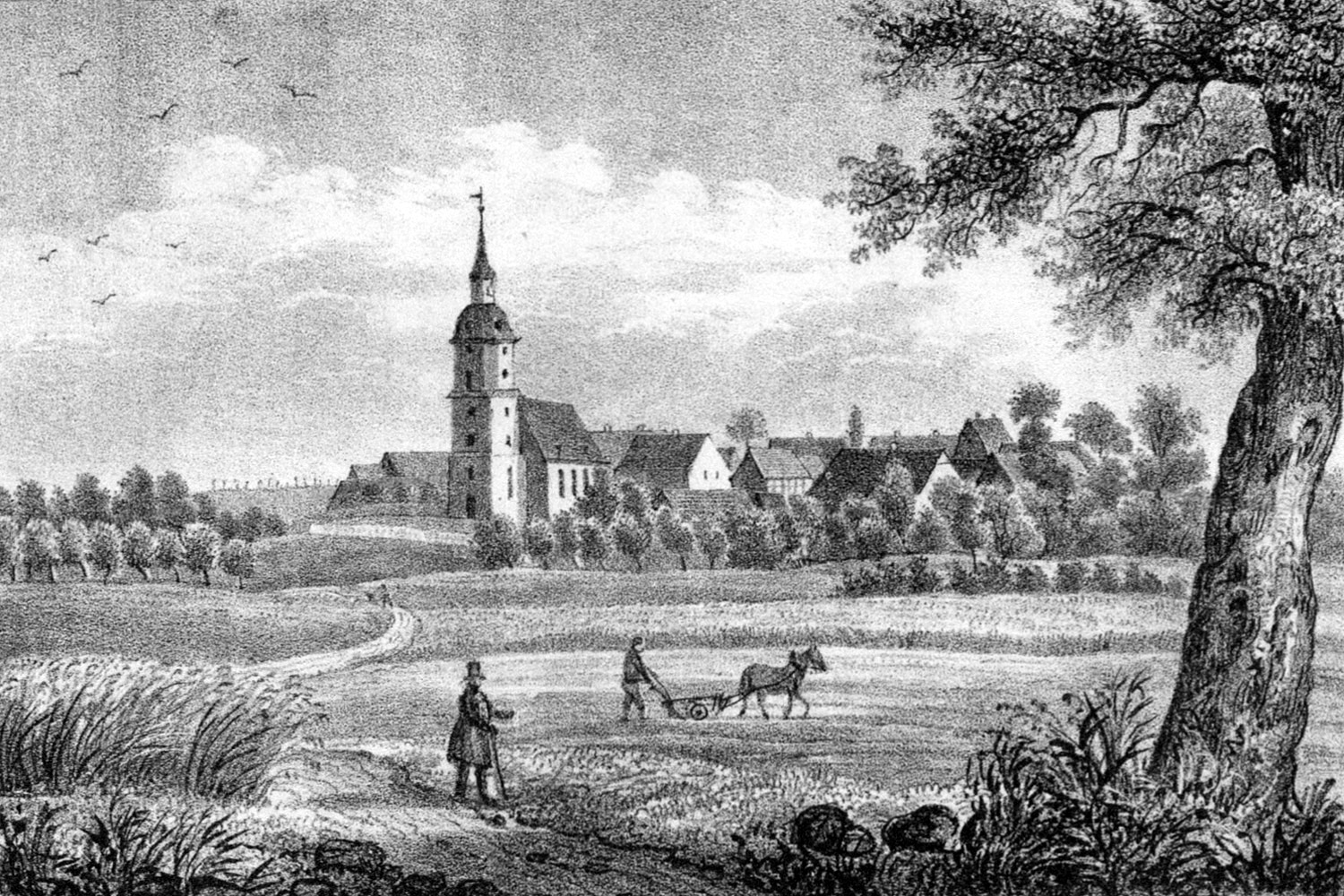 Cröbern um 1840, von Westen gesehen